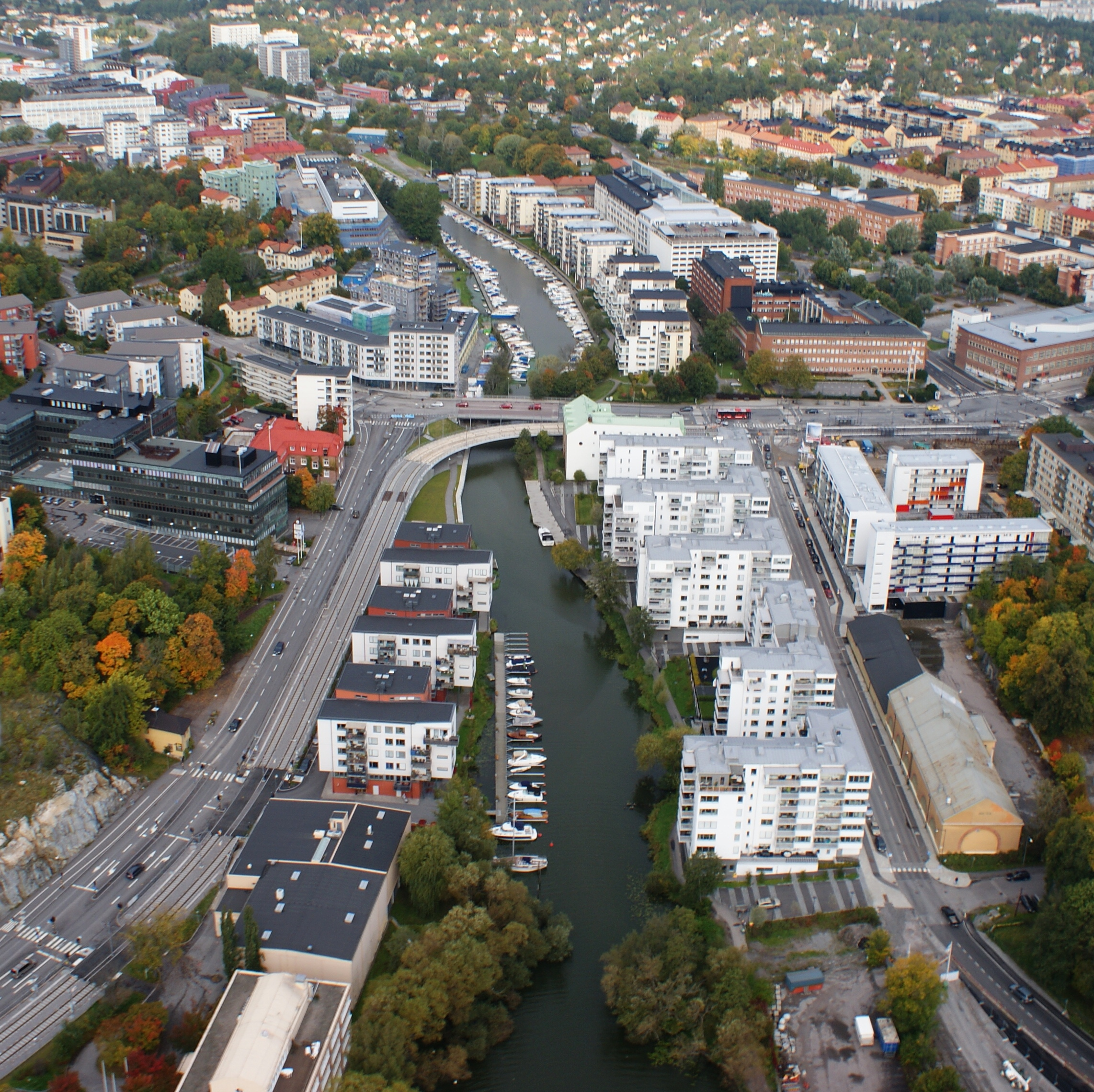 Bällsta vik och där Bällsta bro avdelar till Bällsta å.